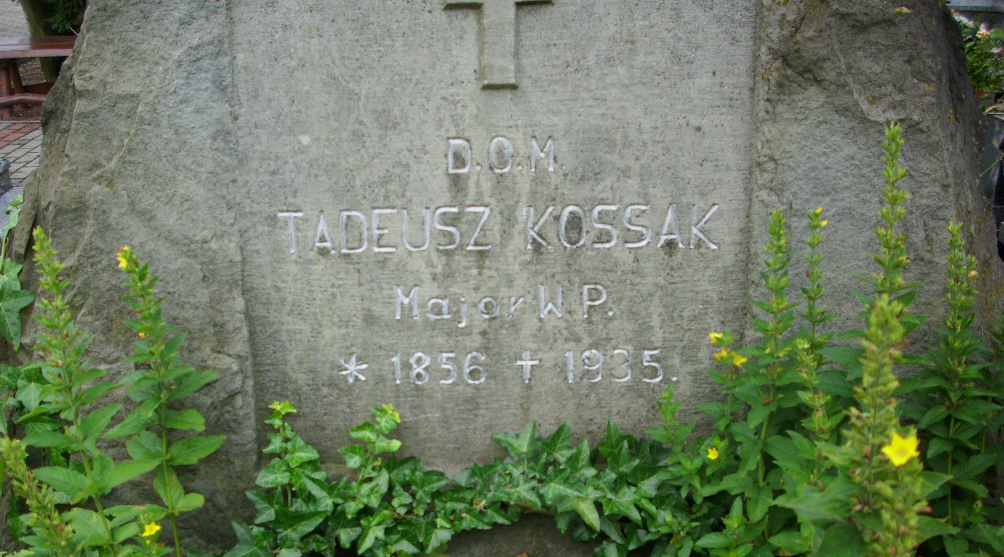 Grób Tadeusza Kossaka